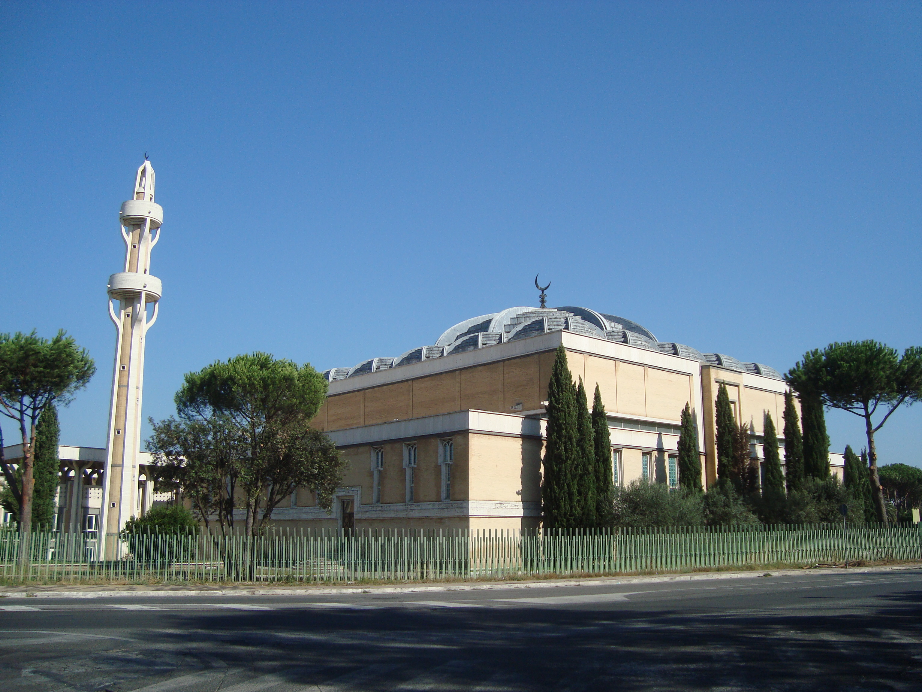 Vue d'ensemble de la grande mosquée de Rome dans le rione de Parioli.